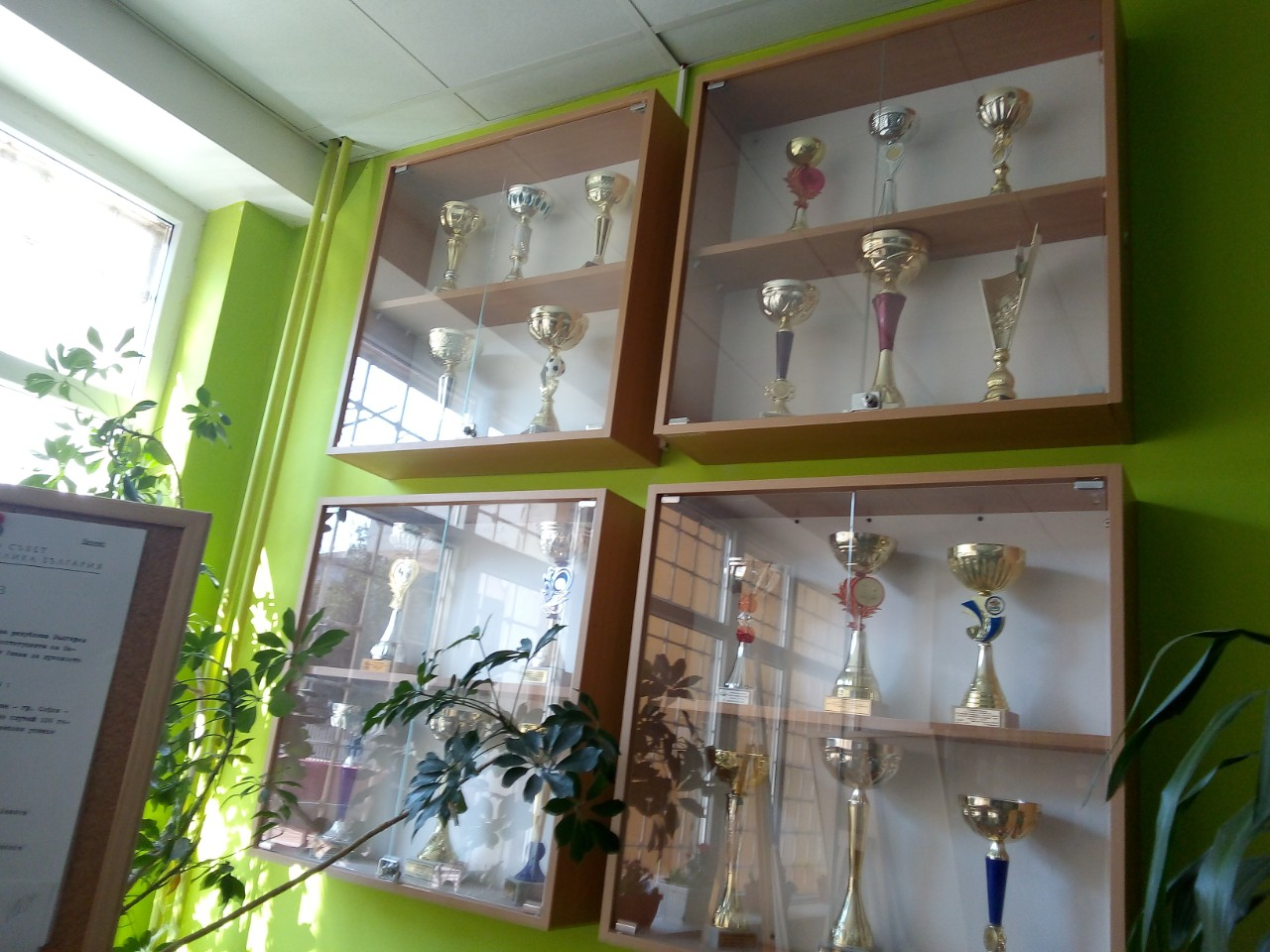 Награди на учениците от 55 СУ Петко Каравелов от спортни и други мероприятия и конкурси.